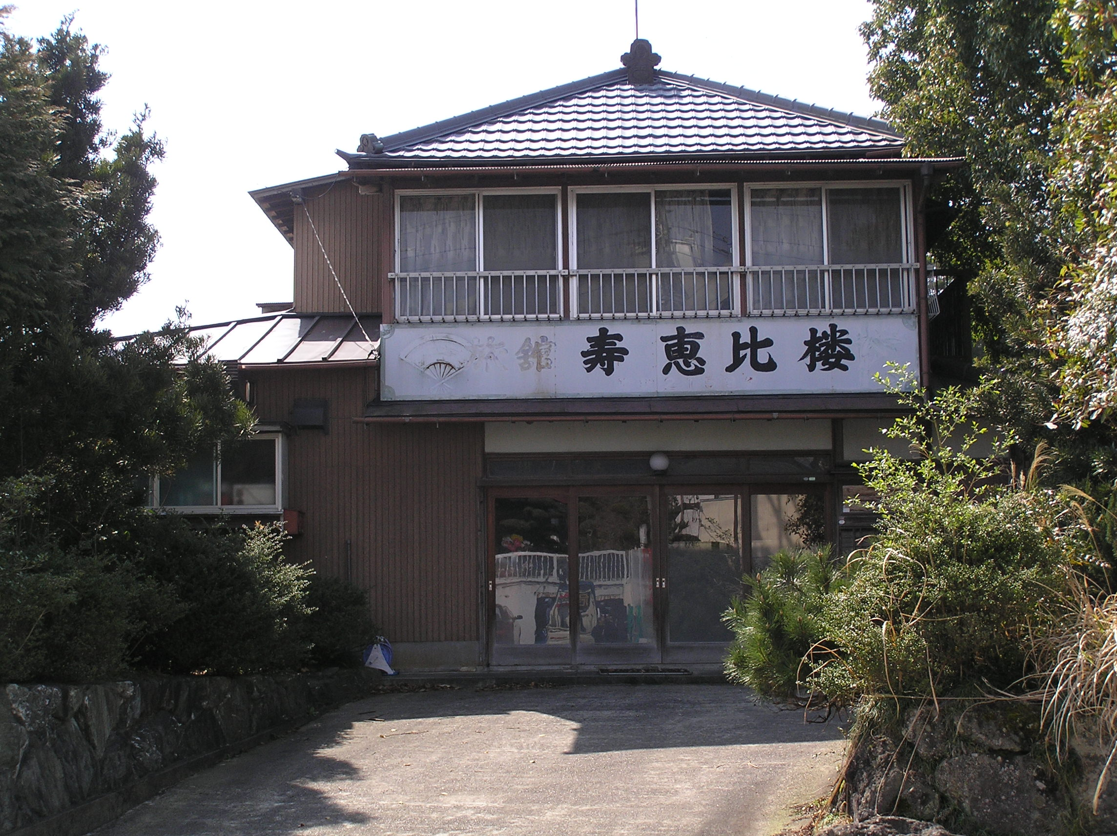 寿恵比楼旅館 廃業 千葉県夷隅郡大多喜町 ～photo by Autumn Snake 【おぉたむすねィく探検隊】